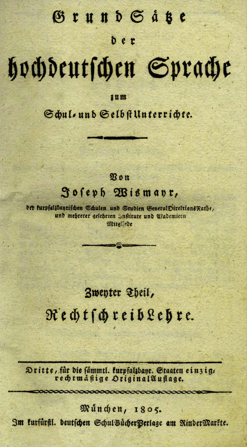 Titelblatt von Joseph Wismayr: GrundSätze der hochdeutschen Sprache zum Schul- und Selbstunterrichte. Zweiter Theil, Rechtschreiblehre. München 1805.